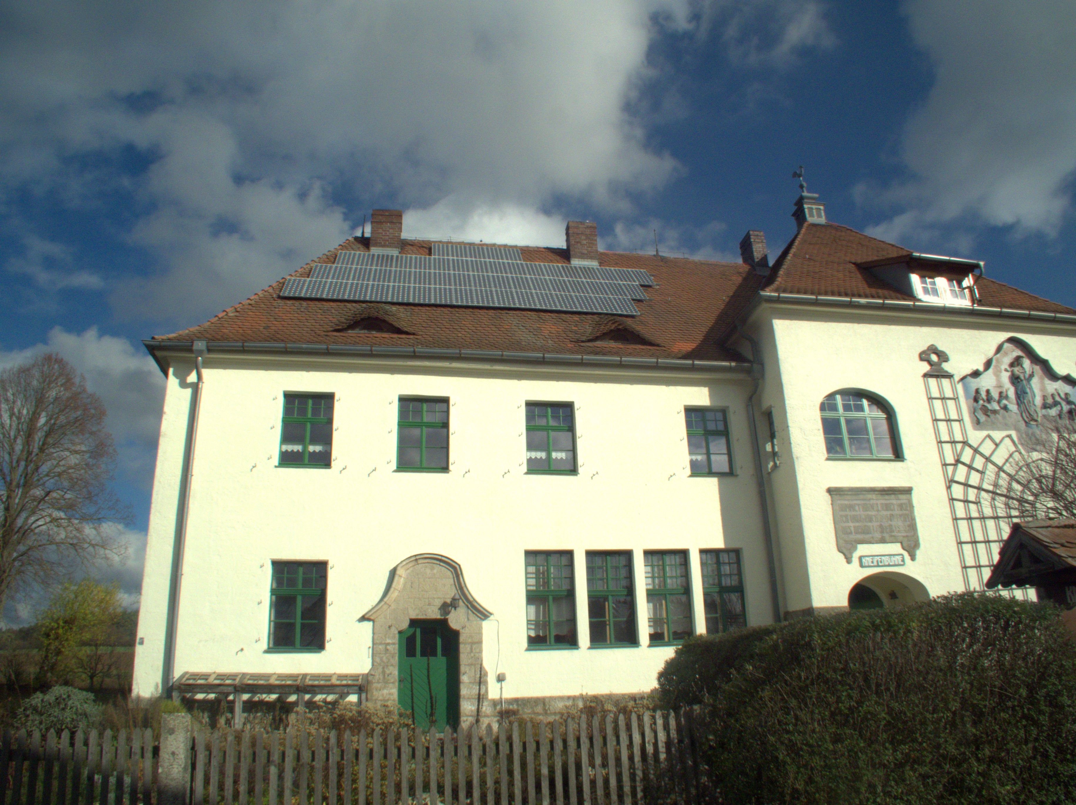 Oberweiling bei Velburg; ehemaliges Schulhaus am Pfarrweg 6. Seit 1981 befindet sich hier die Kneipenbühne und seit 1988 im 1. Stock auch das Knopfstudio.